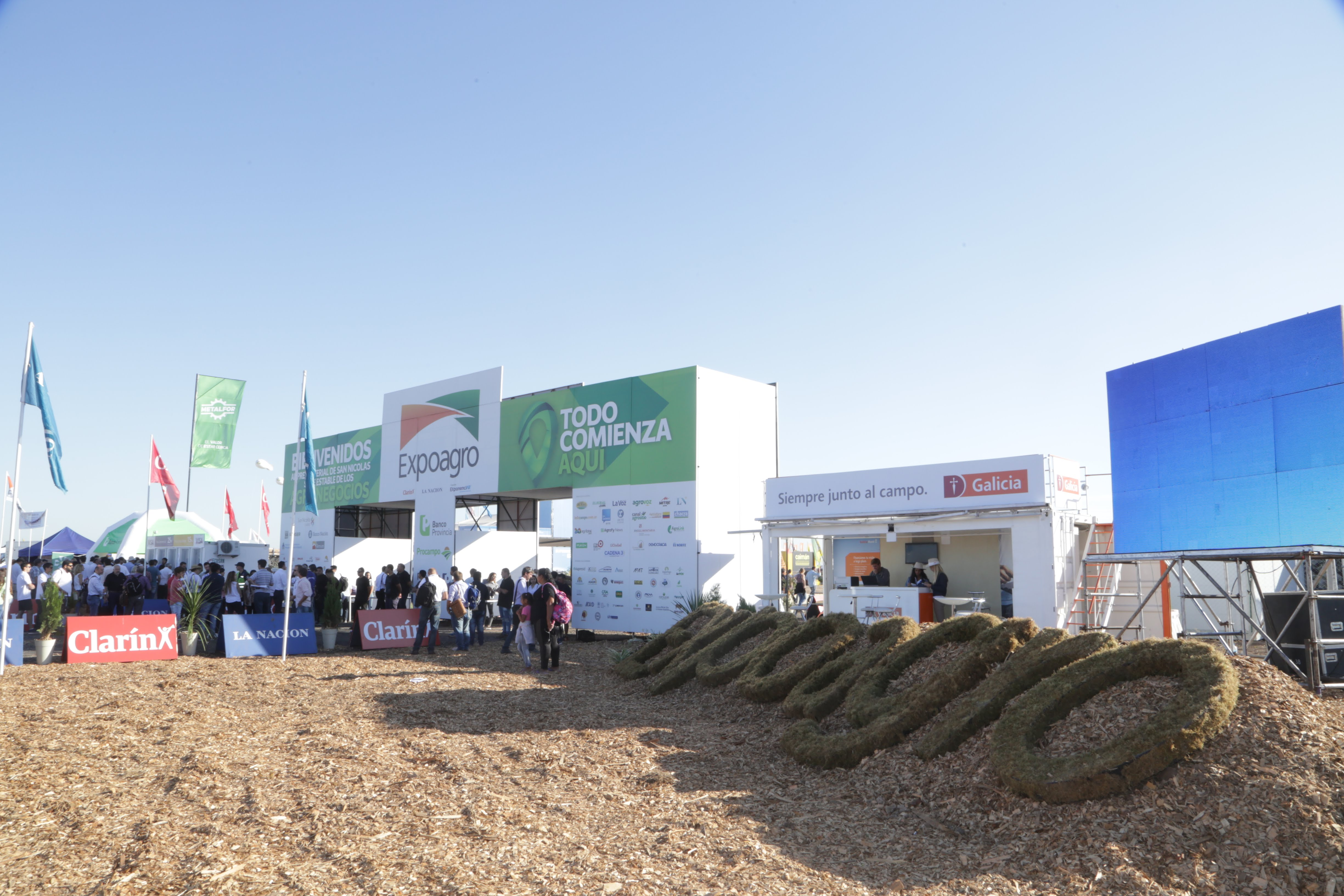 Expoagro Argentina